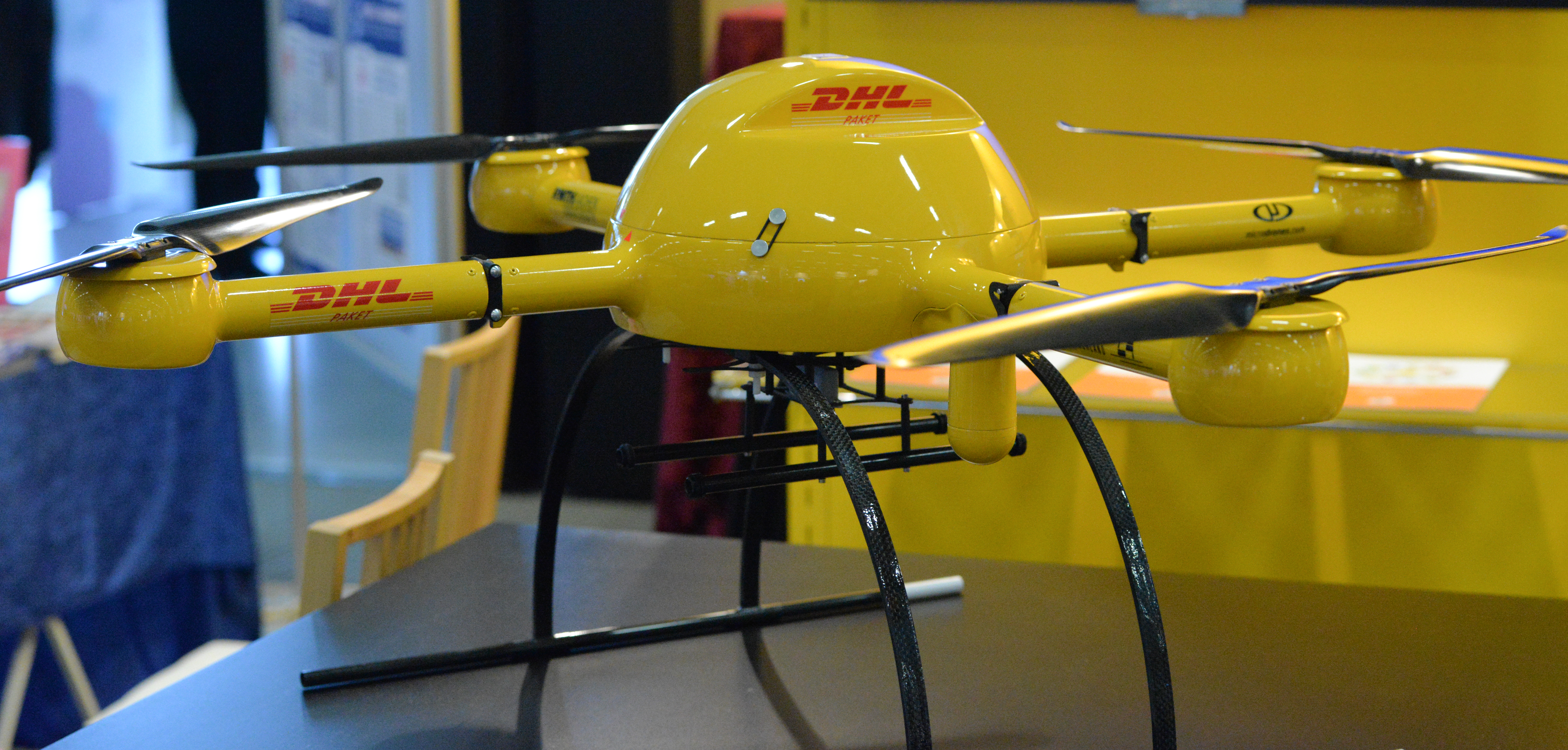 SPD Bundesparteitag Berlin, 10.-12. Dezember 2015, CityCube, Messe Berlin